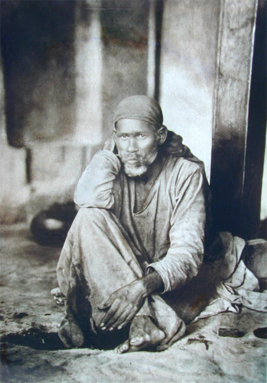 Sai Baba of Shirdi, Hindu saint (1838-1918).